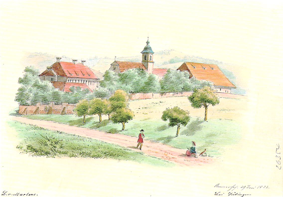 Ammerhof (kolorierte Bleistiftzeichnung, 13,0 x 20,5 cm; Blatt 16,8 x 24,2 cm)